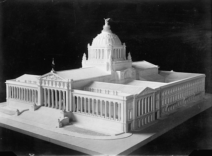 Maqueta del proyecto de Palacio Legislativo promovido por el presidente Porfirio Díaz